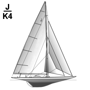 Icone Classe J avec Identifiant Numéro de voile pour Endeavour 1934